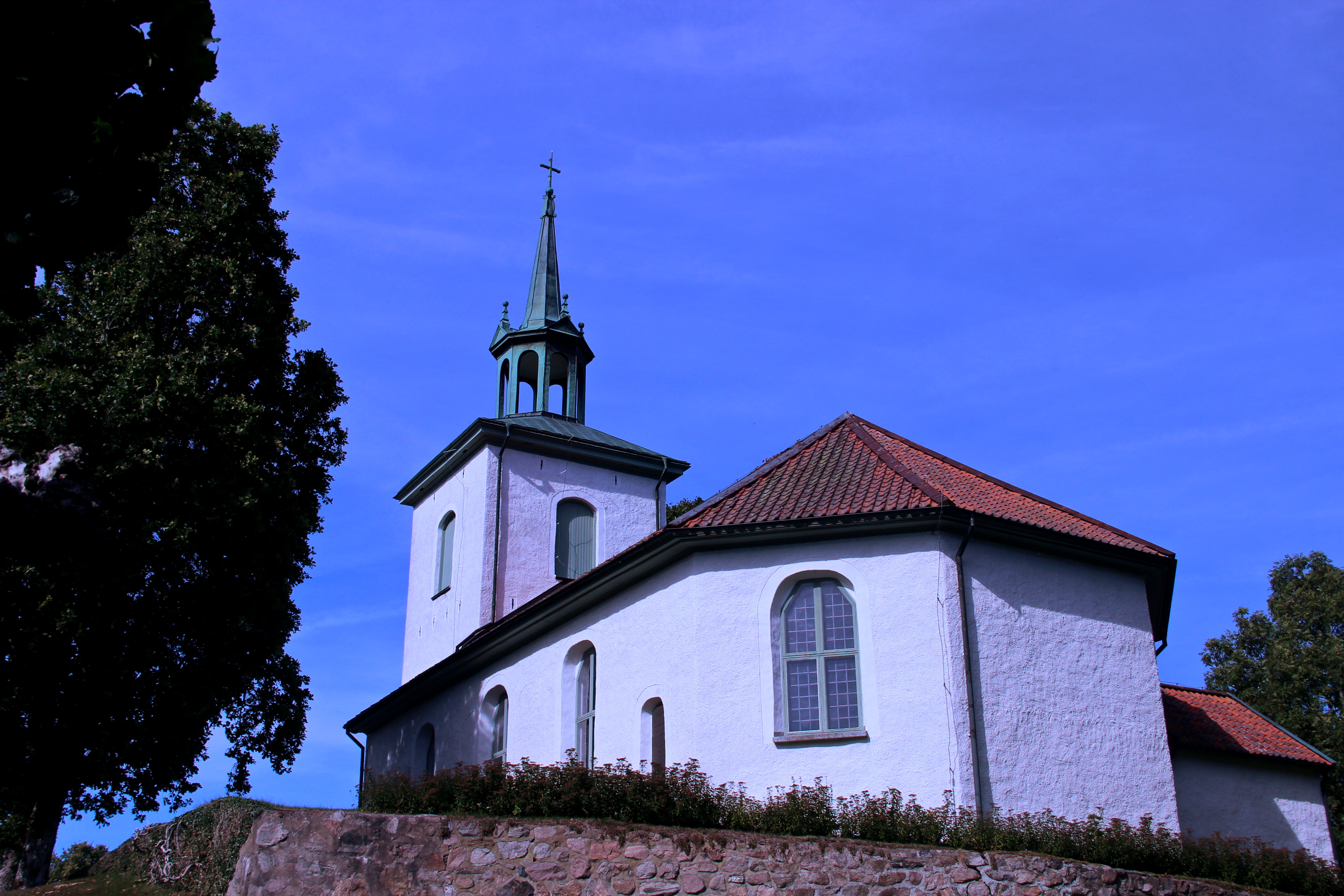 Bitterna kyrka (Västerbitterna 6:1)